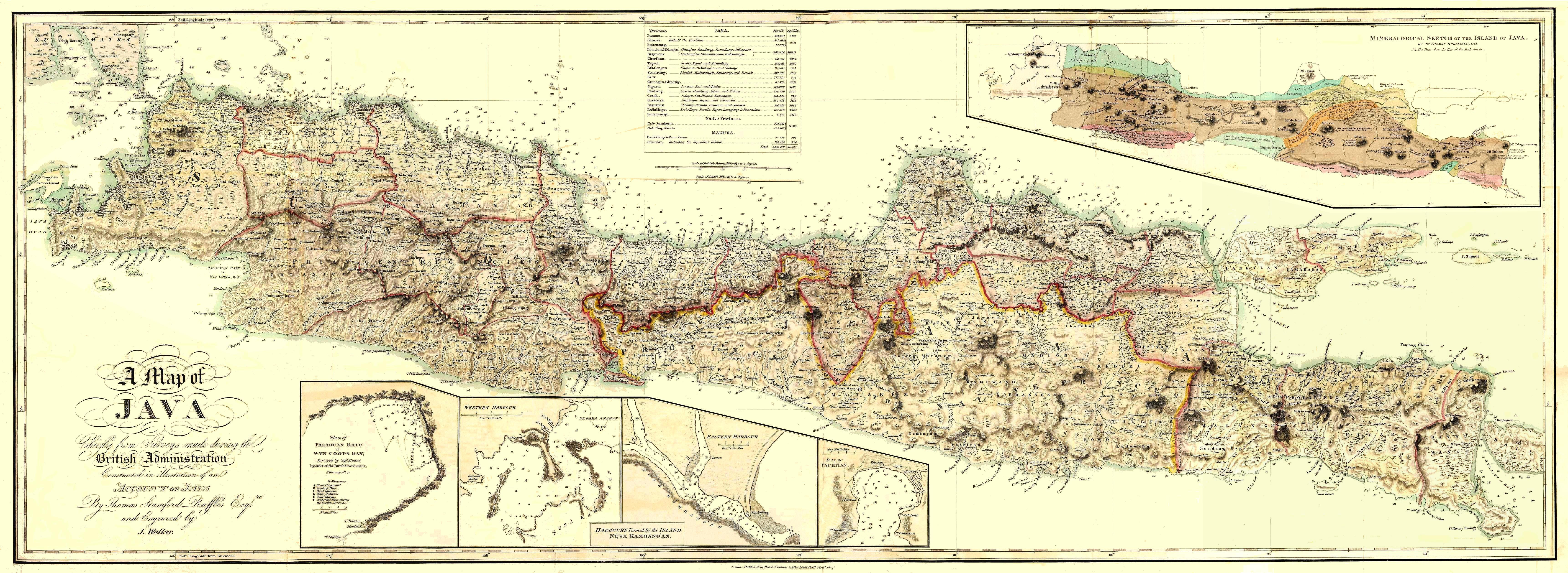 Map of Java